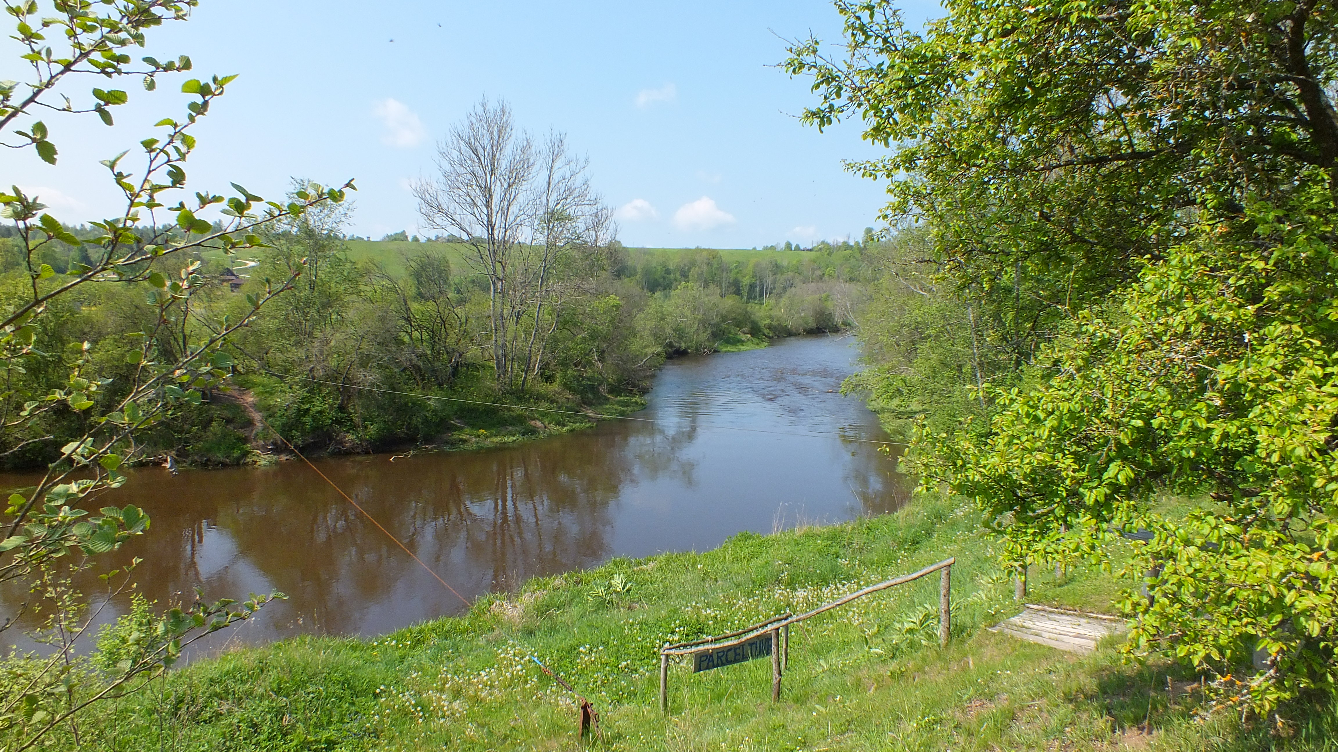 Abava pie Drubazām